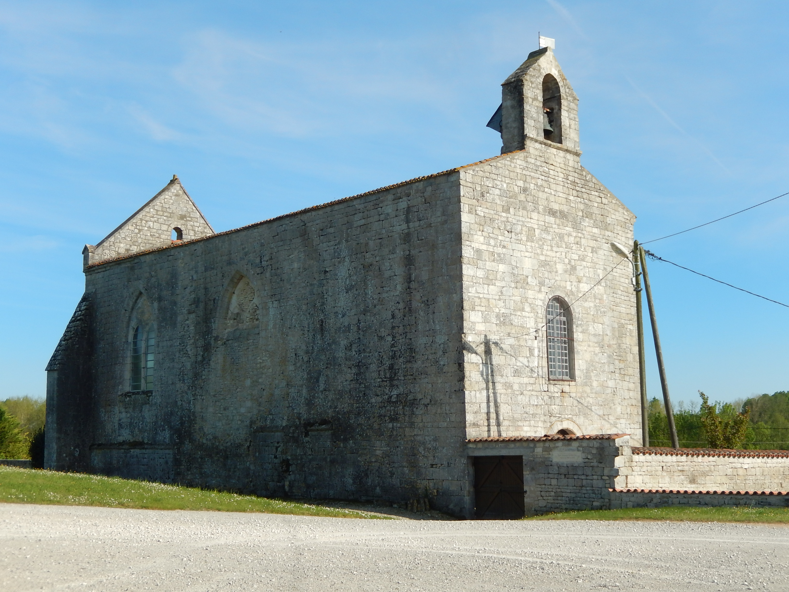 L'église de Saint-Séverin-sur-Boutonne (Charente-Maritime, France) par ses façades nord et ouest.